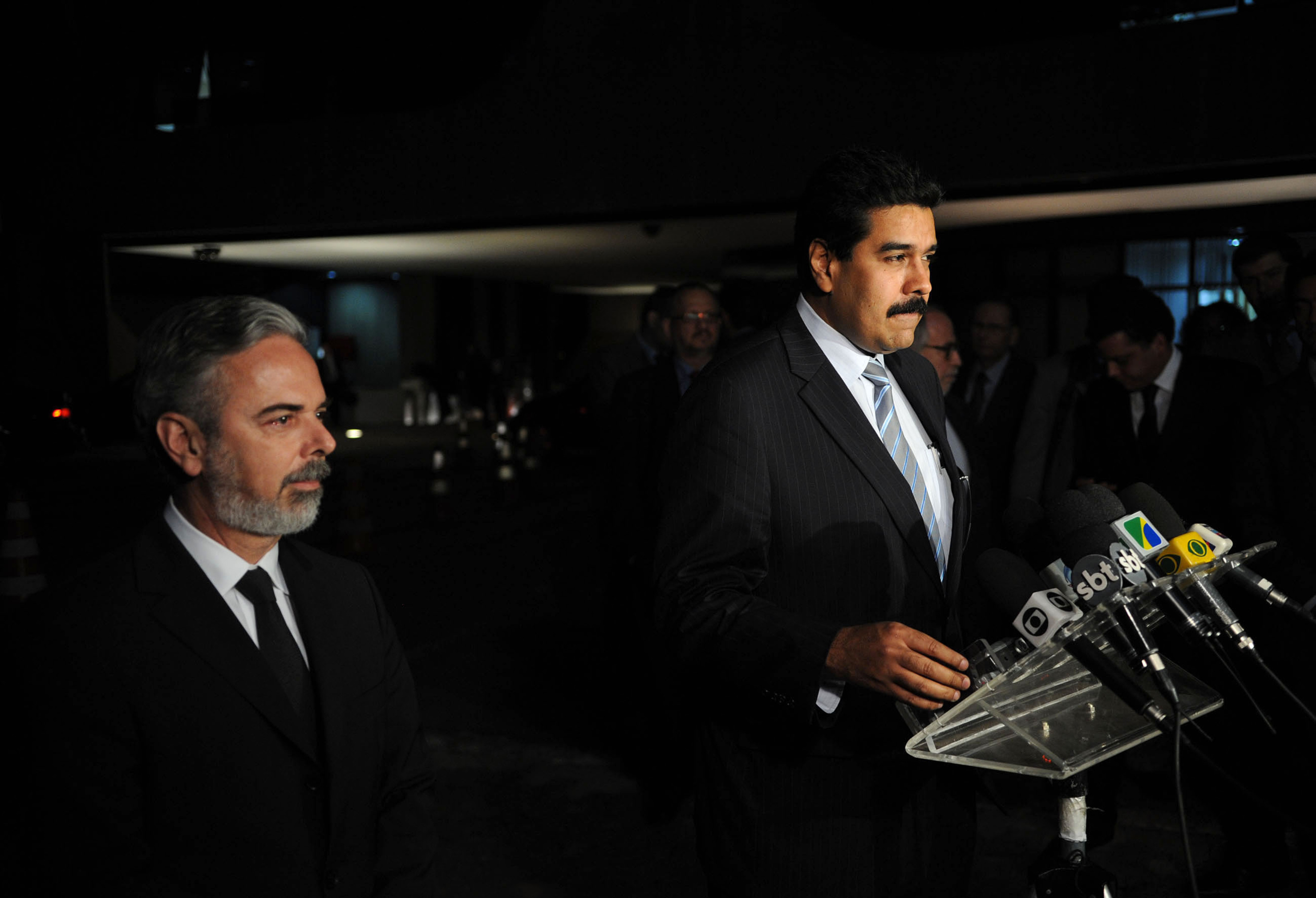 Brasília - O chanceler da Venezuela, Nicolas Maduro, acompanhado do chanceler Brasileiro, Antonio Patriota, fala à imprensa após se reúnir com o presidente Lula (Fabio Rodrigues Pozzebom/ABr)